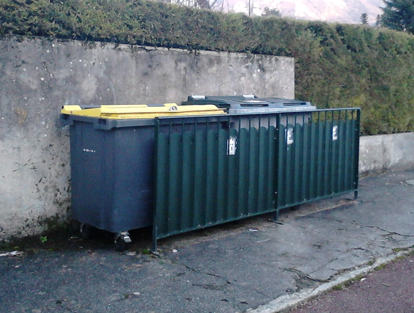 Poubelles de tri sélectif dans un quartier à Aix-les-Bains (73).